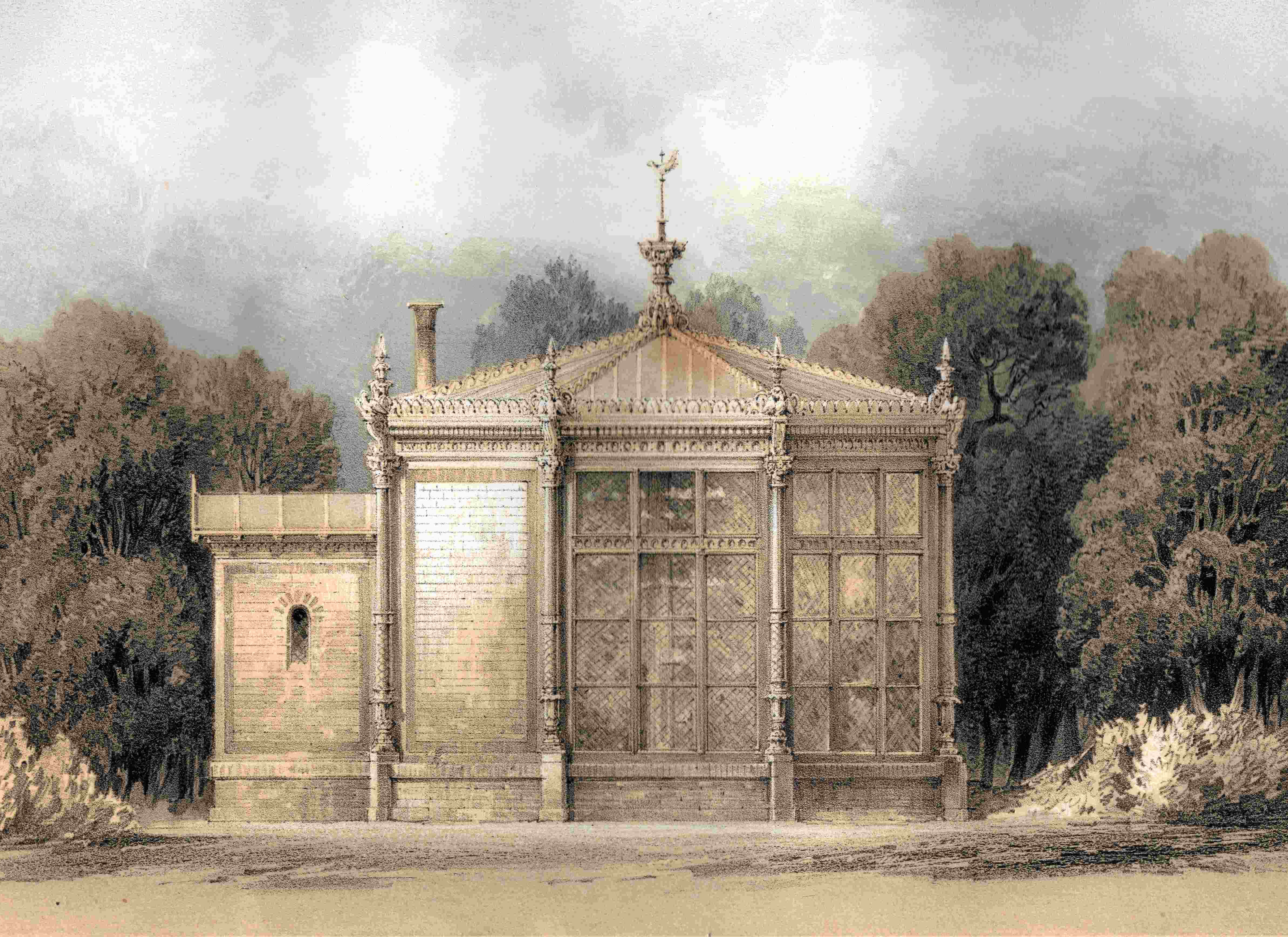 Das Kanarienvogelhaus im Park Klein-Glienicke